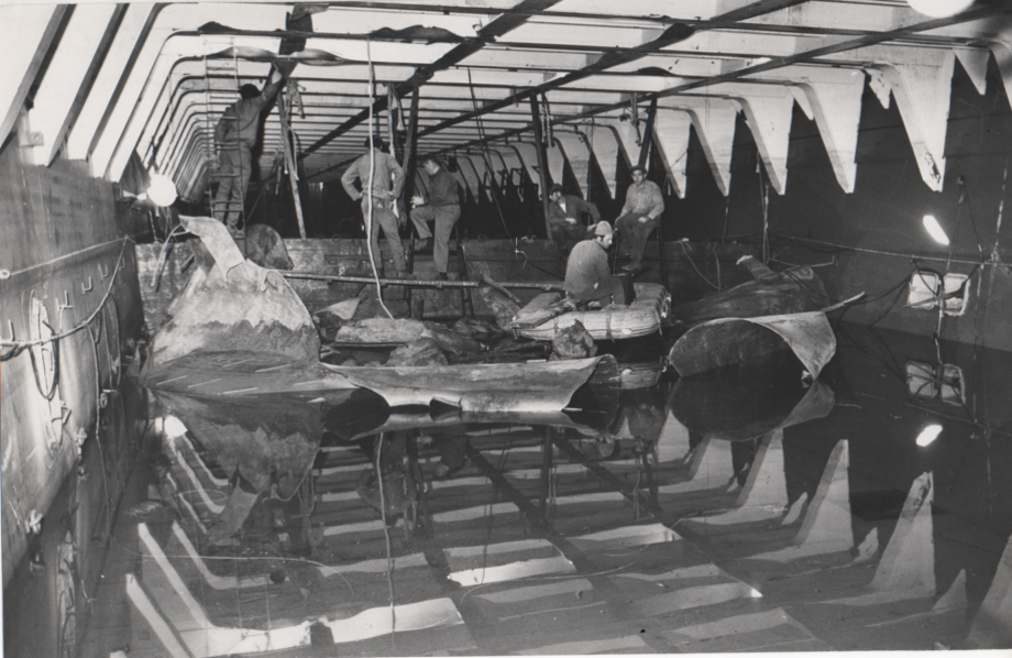 תיקון החבלה באח"י בת שבע על ידי לוחמי 707 כולל צלילות בתוך המחסן